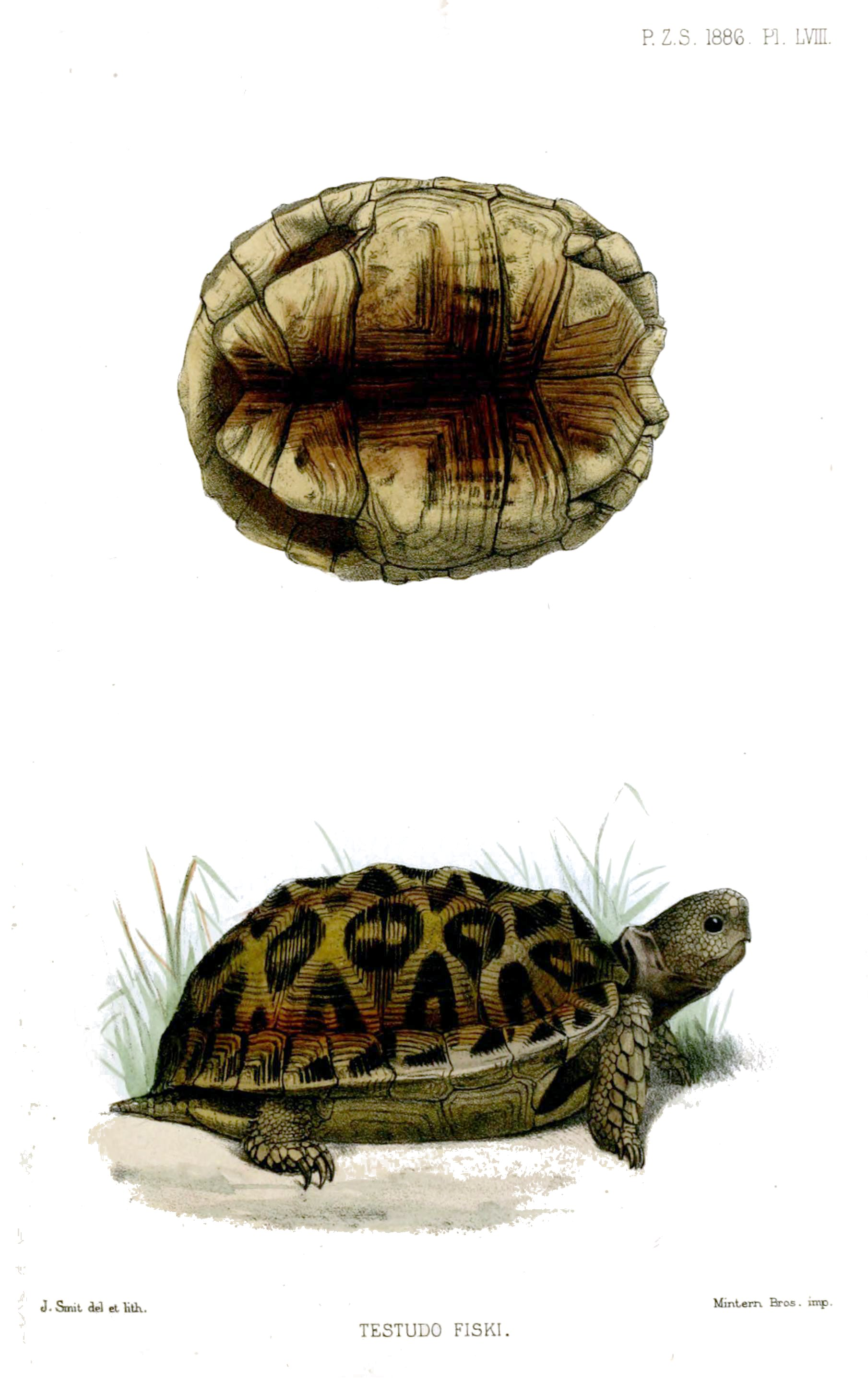 Testudo fiski = Psammobates tentorius